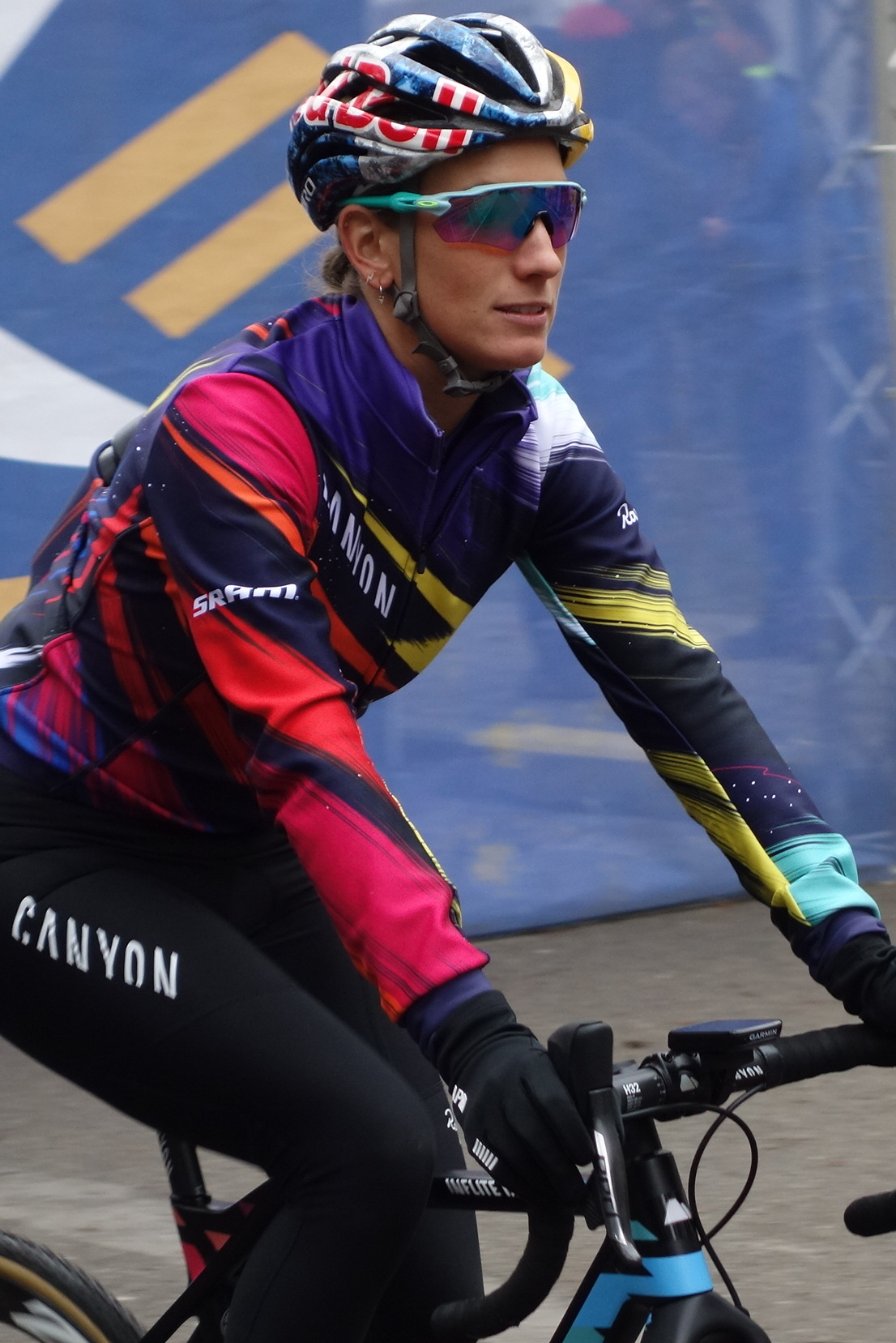 Voor de start van de tweede editie van de Brussels Universities Cyclocross (DVV Verzekeringen Trofee) op de campus van de VUB & ULB op zondag 5 januari 2020.